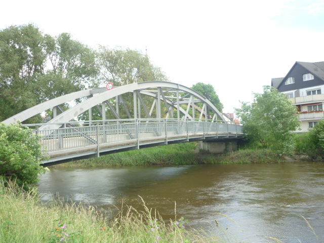 BodLöd